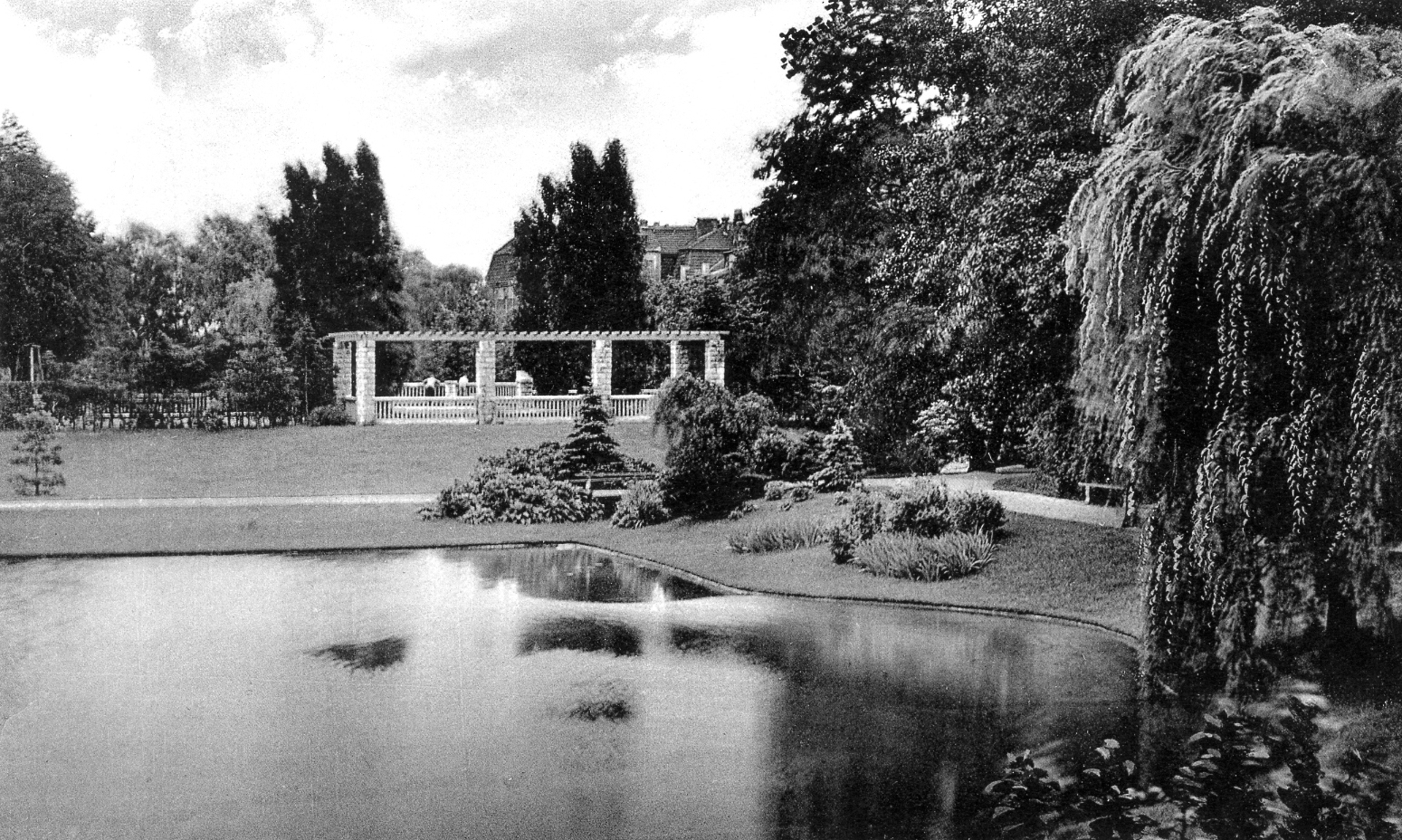 Berlin-Karlshorst, Seepark um 1930